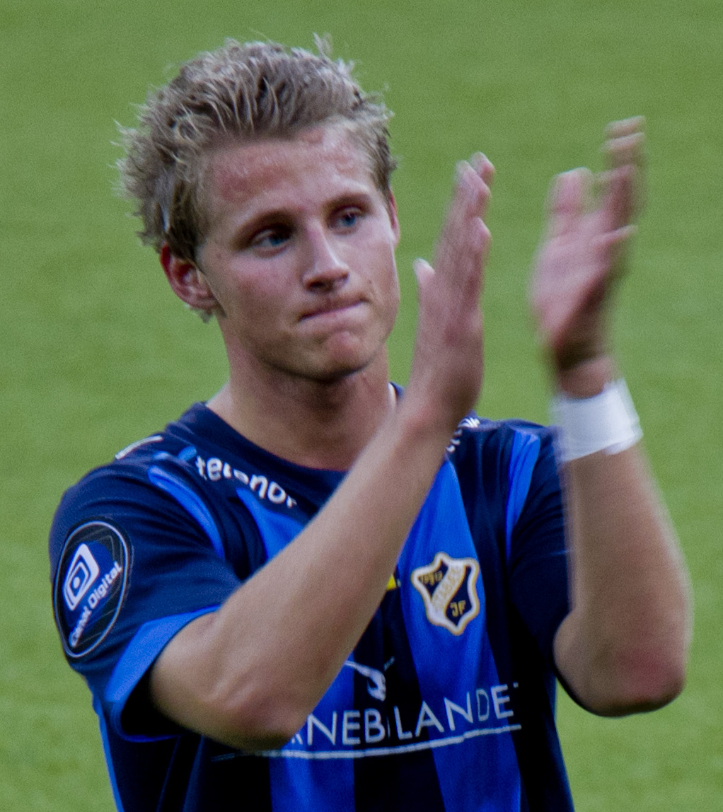 Vegar Hedenstad after Stabæk-loss against Sogndal, May 16th 2011.